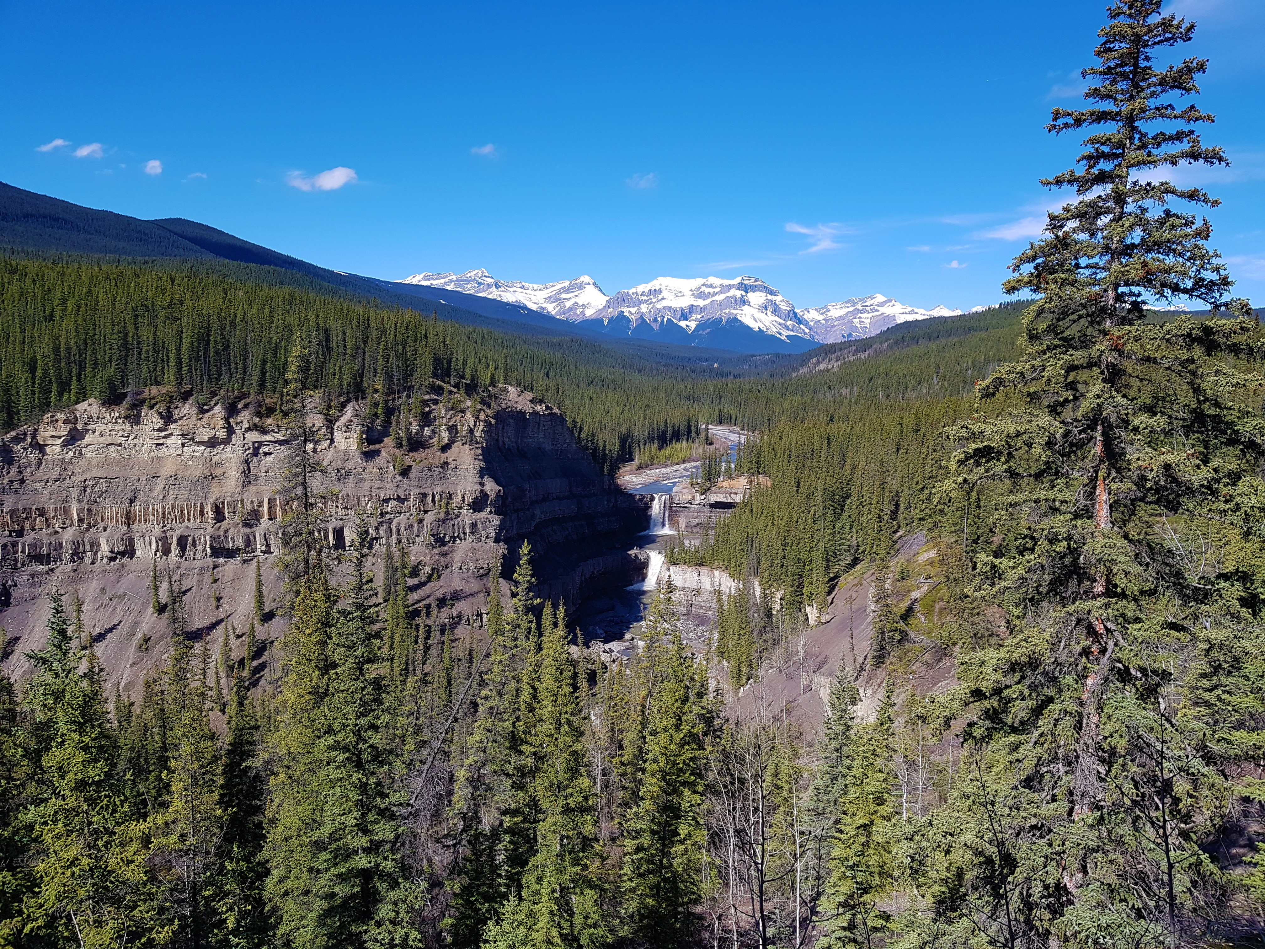 Crescent falls captured from the hiking trail nearby.